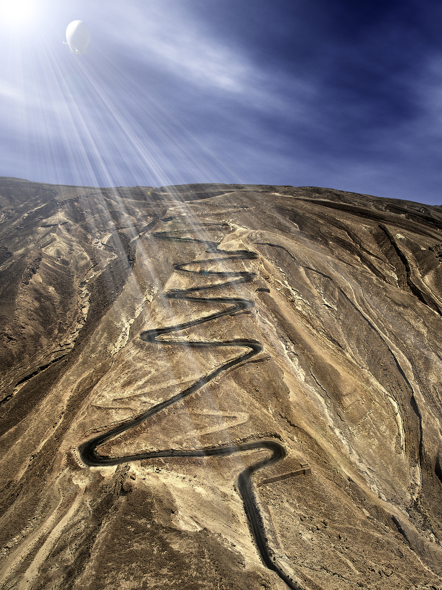 דרך תלולה ומפותלת בנגב המזרחי, מדרום למכתש הקטן, בקטע המרכזי של כביש 227. המעלה שימש עורק תחבורה עיקרי בין באר שבע לאילת מאז סלילת הכביש במקום ב-1927 ועד 1956, אז נסלל כביש מעלה העצמאות (כביש 40). בראש המעלה ניצבת אנדרטה בצורת צריח (סמל חיל ההנדסה הישראלי) שהוקמה לזכר הנופלים במבצע לוט ב-1950. מעל לאנדרטה, בראש המצפה, נמצא לוח זיכרון לזכר הנרצחים בטבח מעלה עקרבים שאירע ב-17 במרץ 1954.